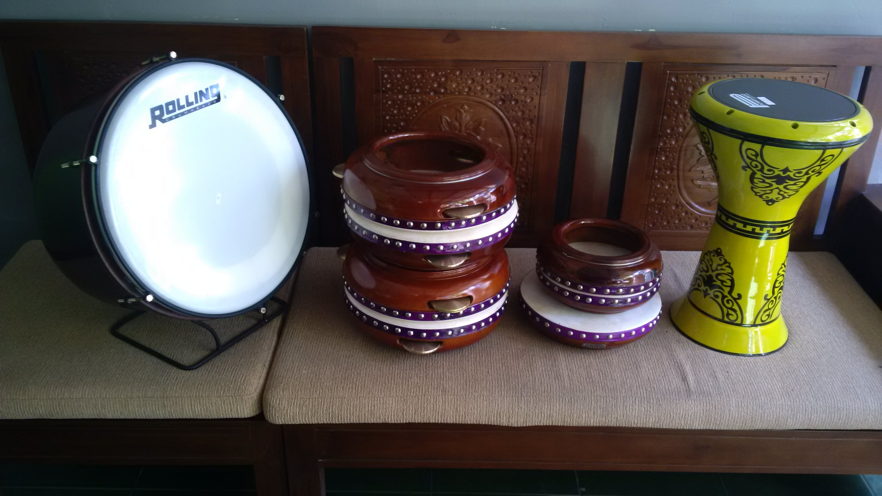 Rebana Hadroh